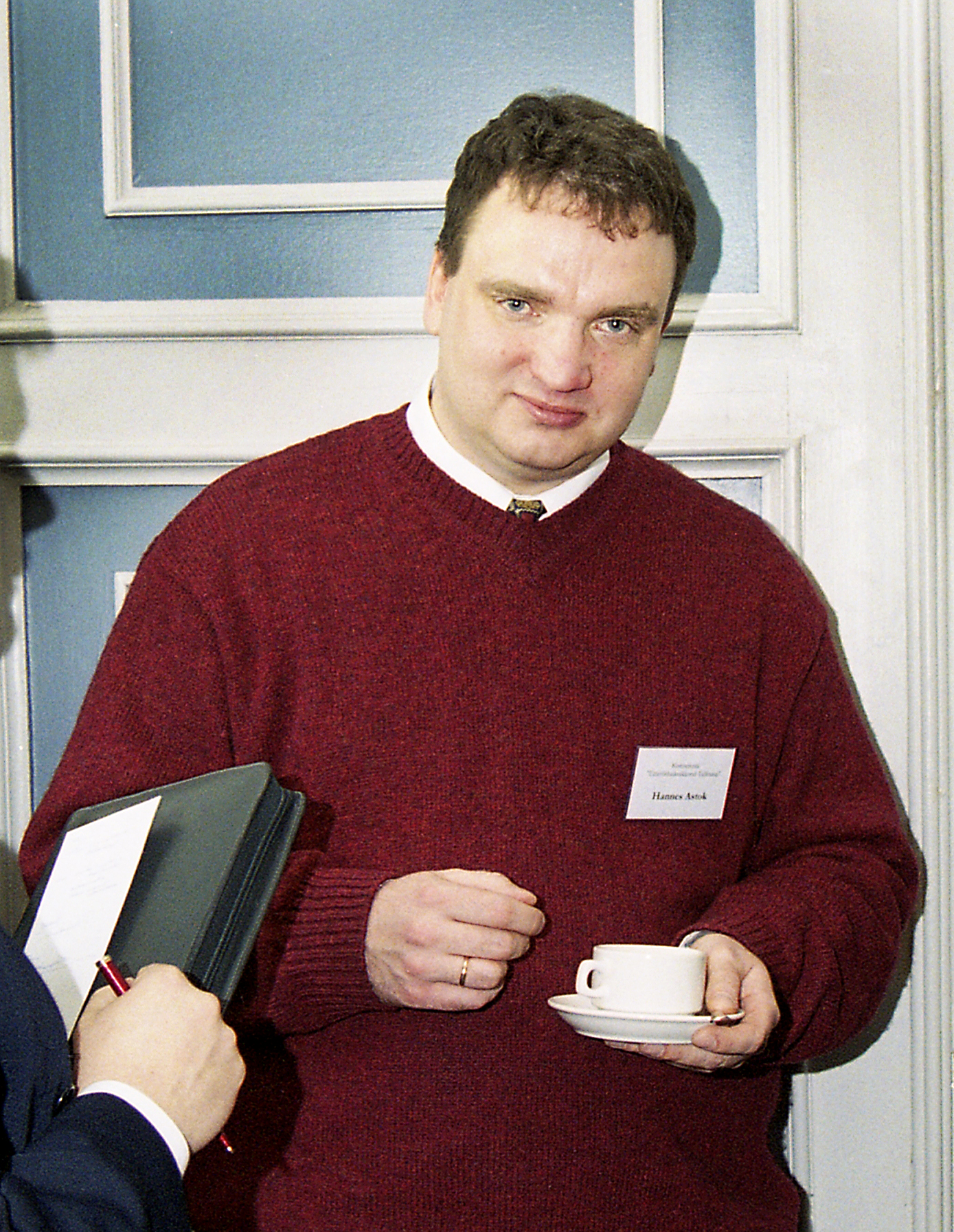 Hannes Astok, poliitik, ajakirjanik ja omavalitsustegelane 02